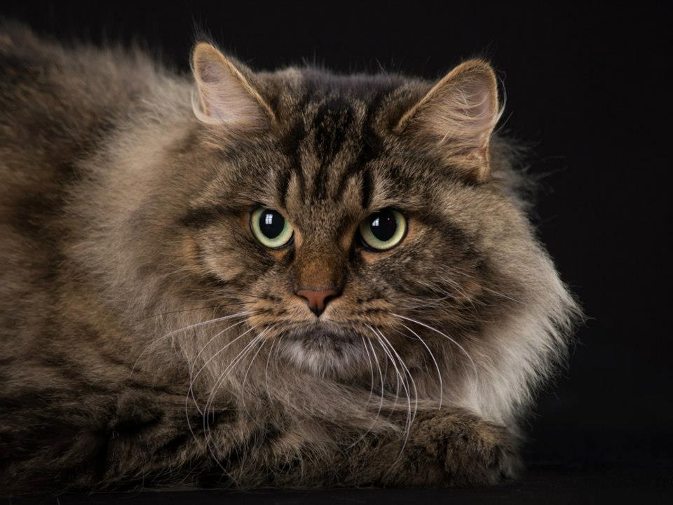 типична сибирска котка